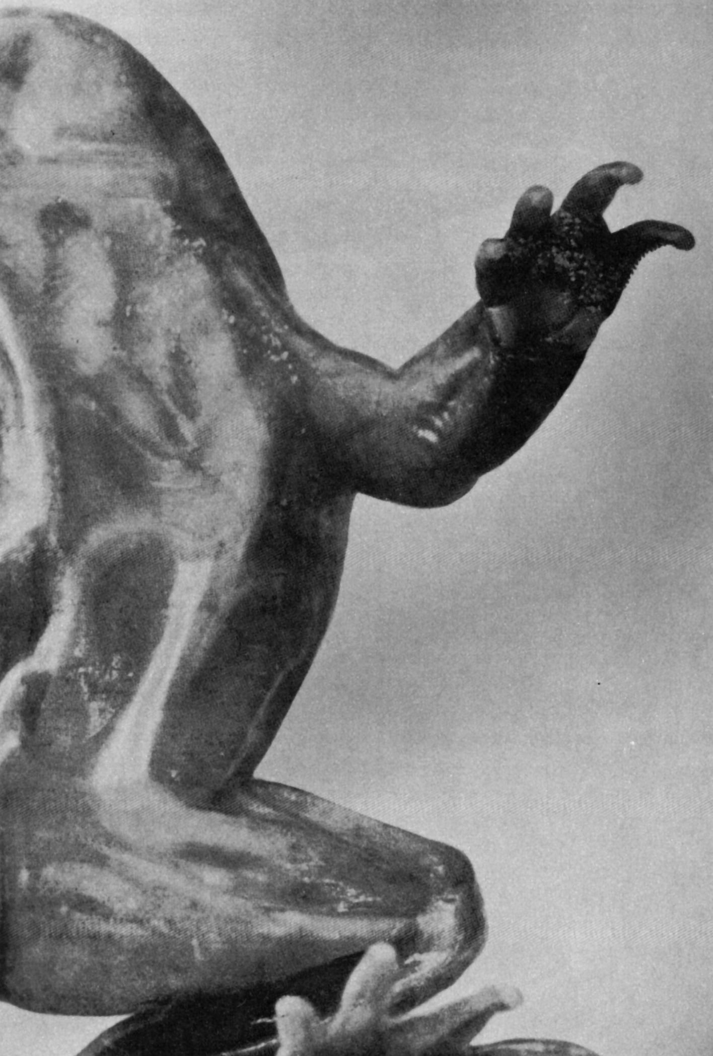 Die präparierte Geburtshelferkröte Kammerers